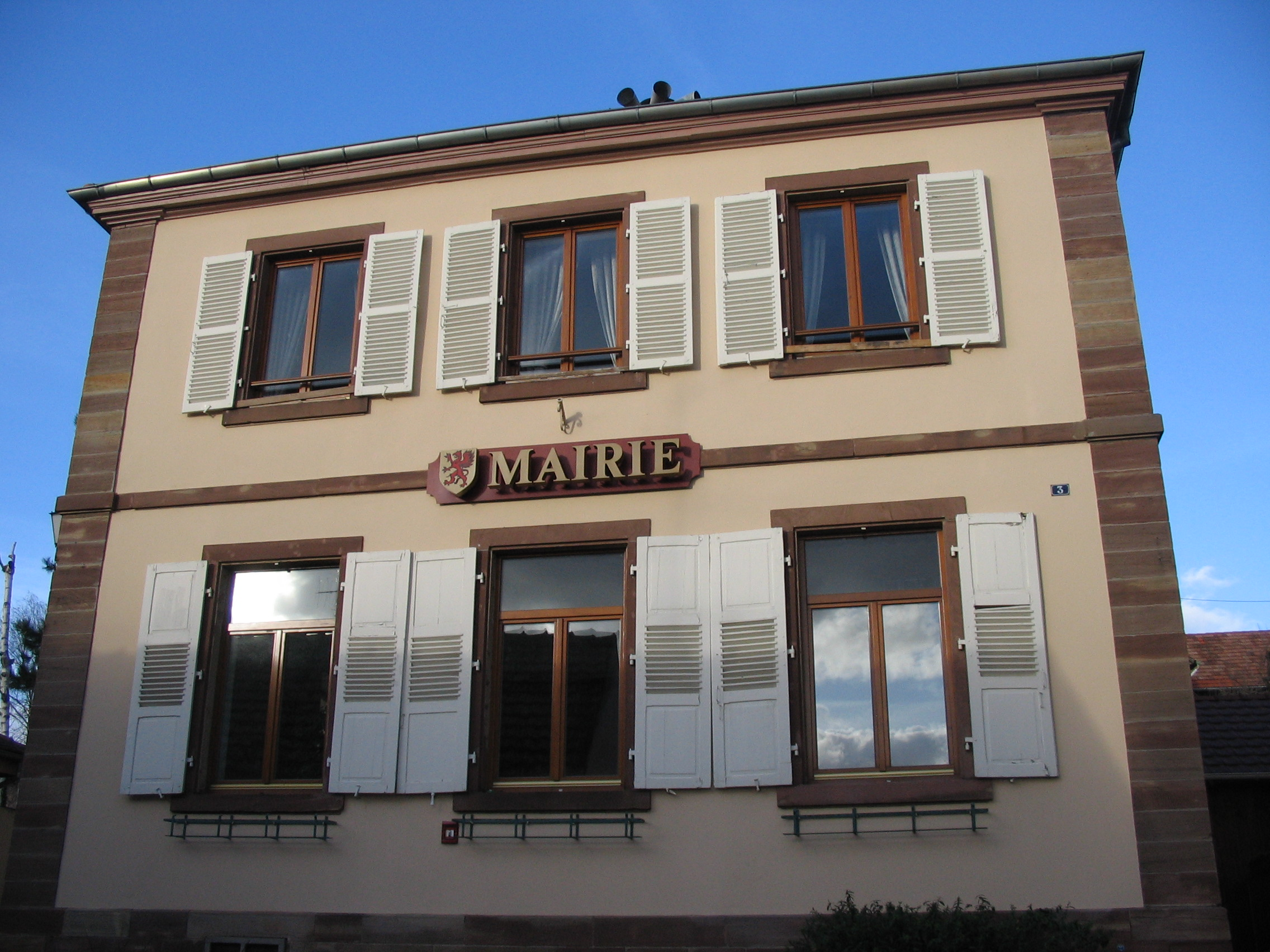 mairie de Pfulgriesheim (Bas-Rhin) recensée à l'inventaire général du patrimoine